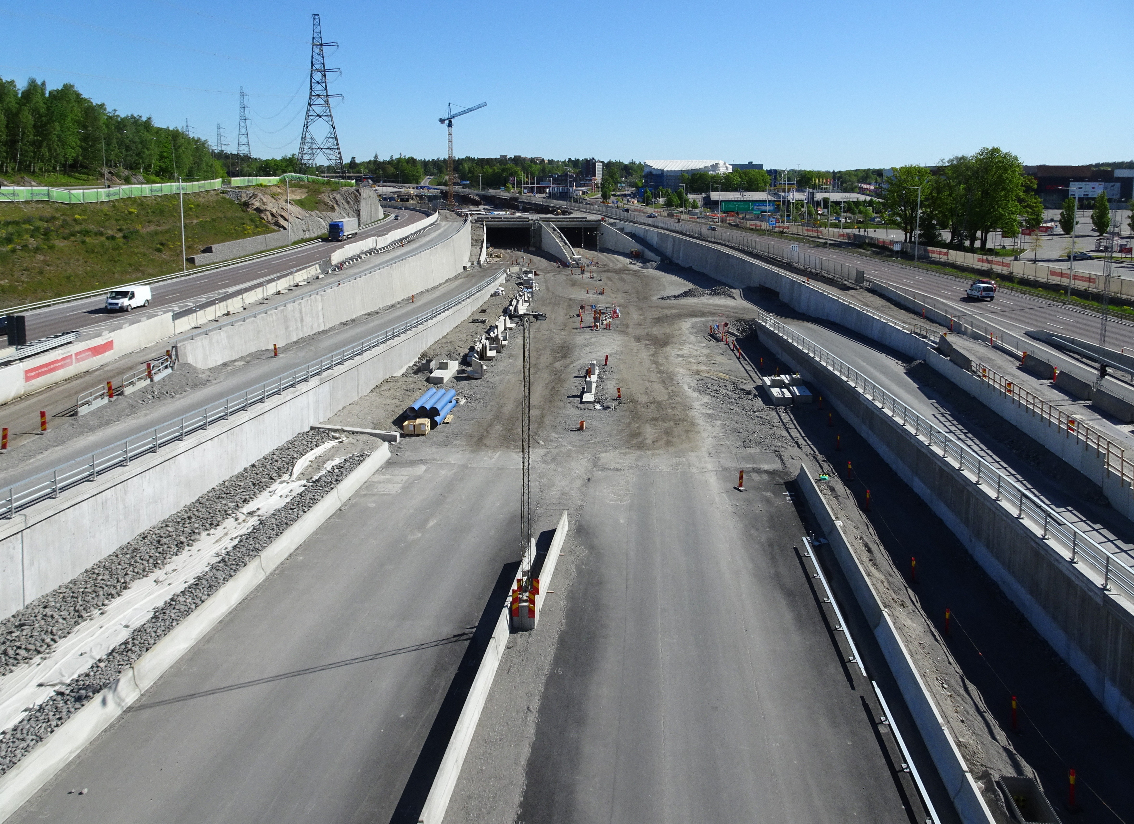 Förbifart Stockholm, trafikplats Kungens kurva, vy österut, tunnelmynningen